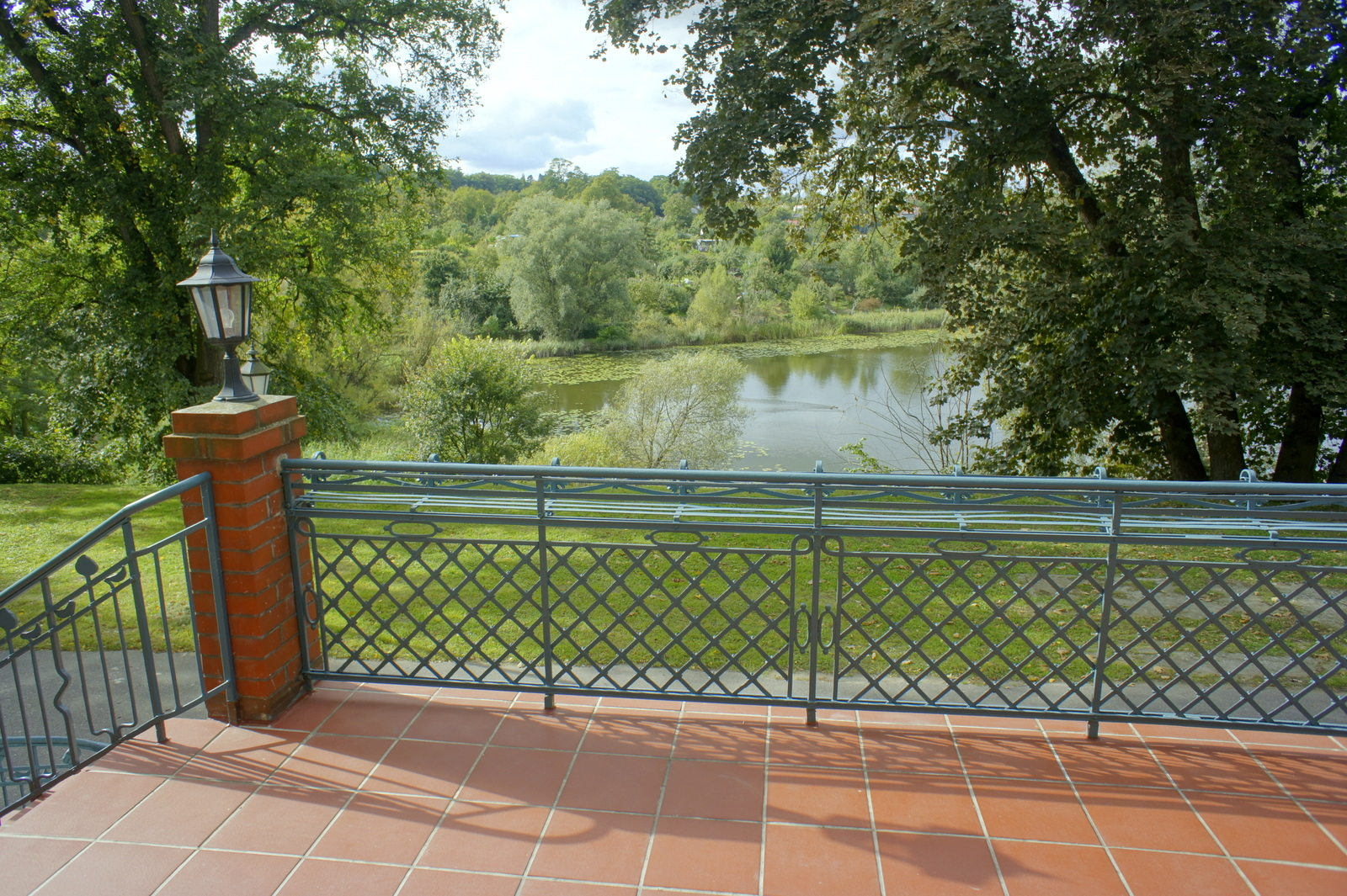 Gorzów Wielkopolski, ul. Kazimierza Wielkiego 1. Podmiejska rezydencja Karla Bahra z lat 1902-1903, widok z tarasu (zabytek nr 439/97)